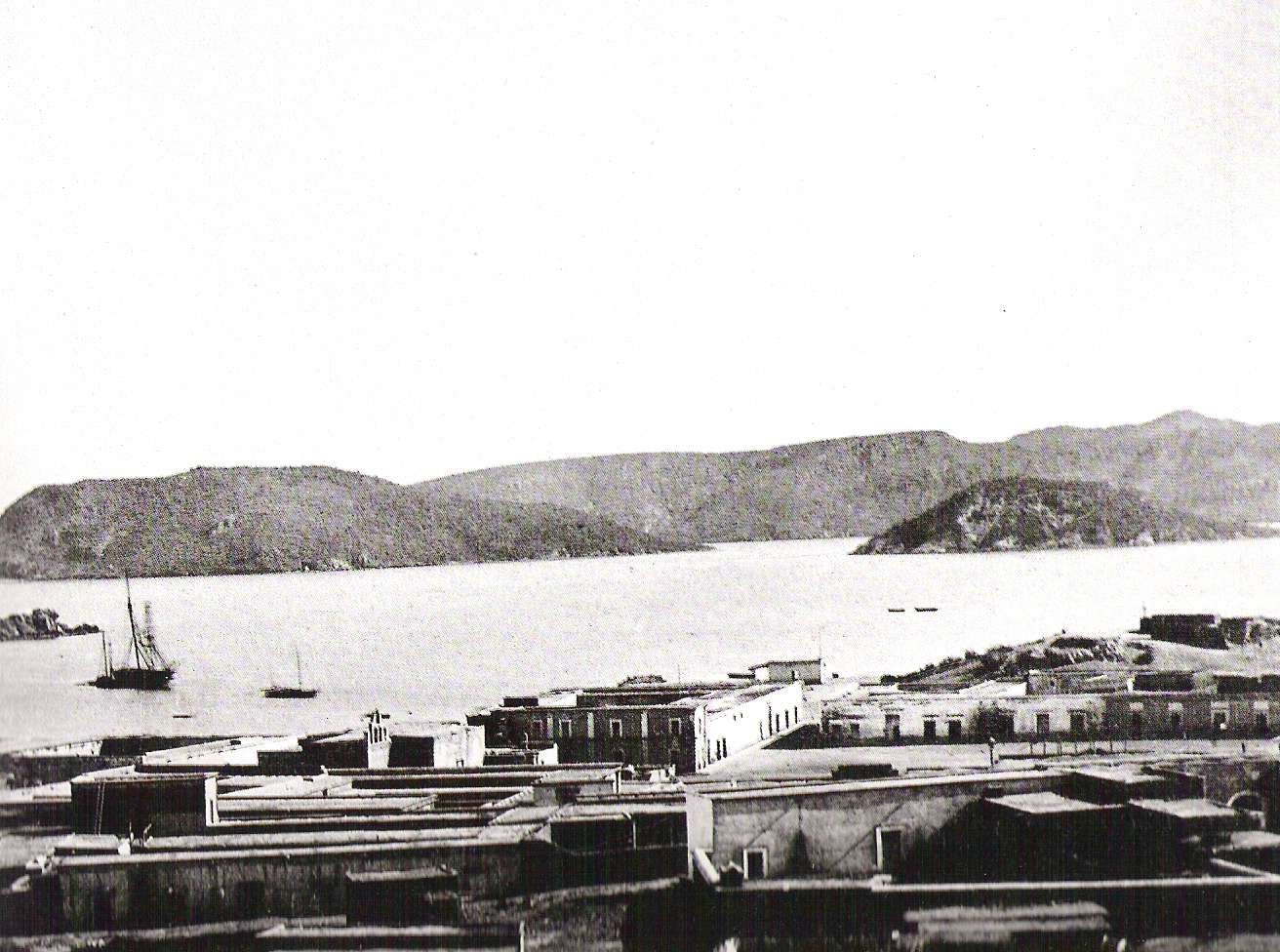 Guaymas al centro la casa del Viseconsul Jose Calvo, sin la plaza de los tres presidentes, y aun con el cerro del fortin